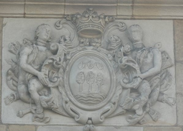 Lezoko (Gipuzkoa) Udaletxean dagoen armarria